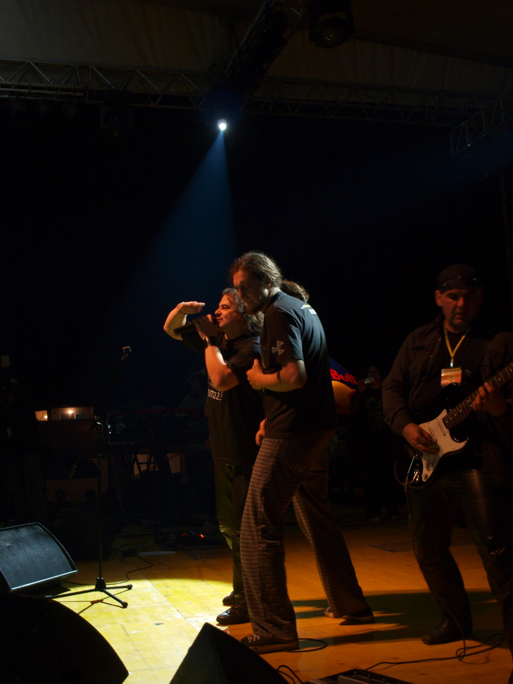 Sastav Opća opasnost. Koncert na 7. Mega Bikers susretima u Slavonskom Brodu.